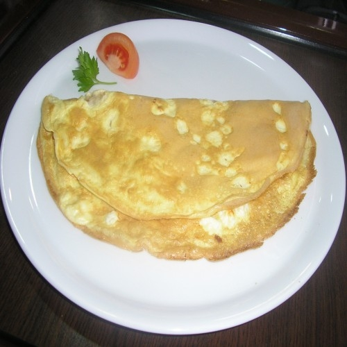 Омлет натюр